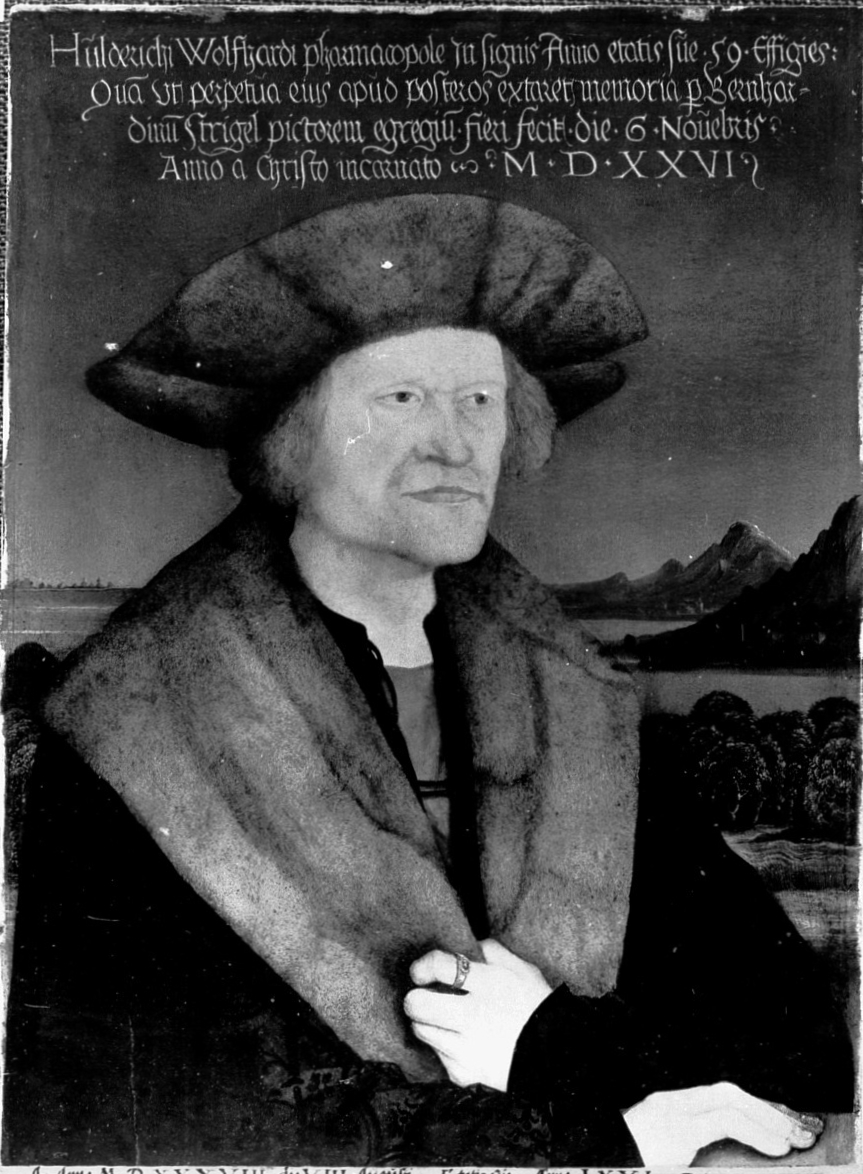 Bernhard Strigel, Bildnis des Apothekers Holderich Wolfardt, 1526 mit Biberfellkragen.(nach Alexander Tuma: Die Geschichte der Kürschnerei, Verlag Alexander Tuma, Wien 1967, S. 197)